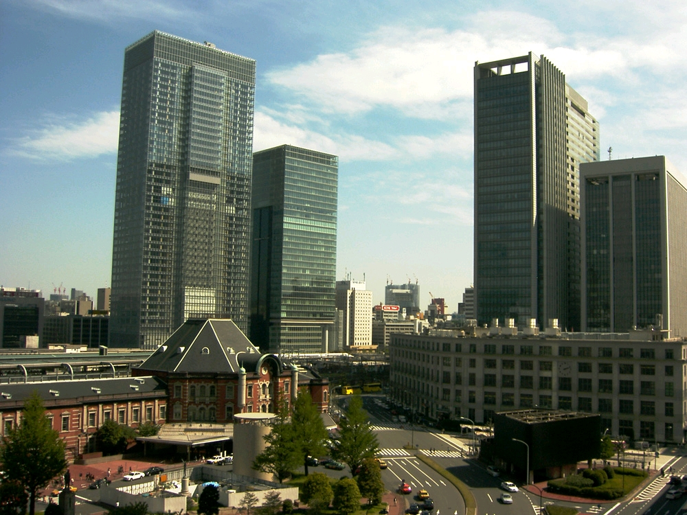 “Tokyo Station” Japan